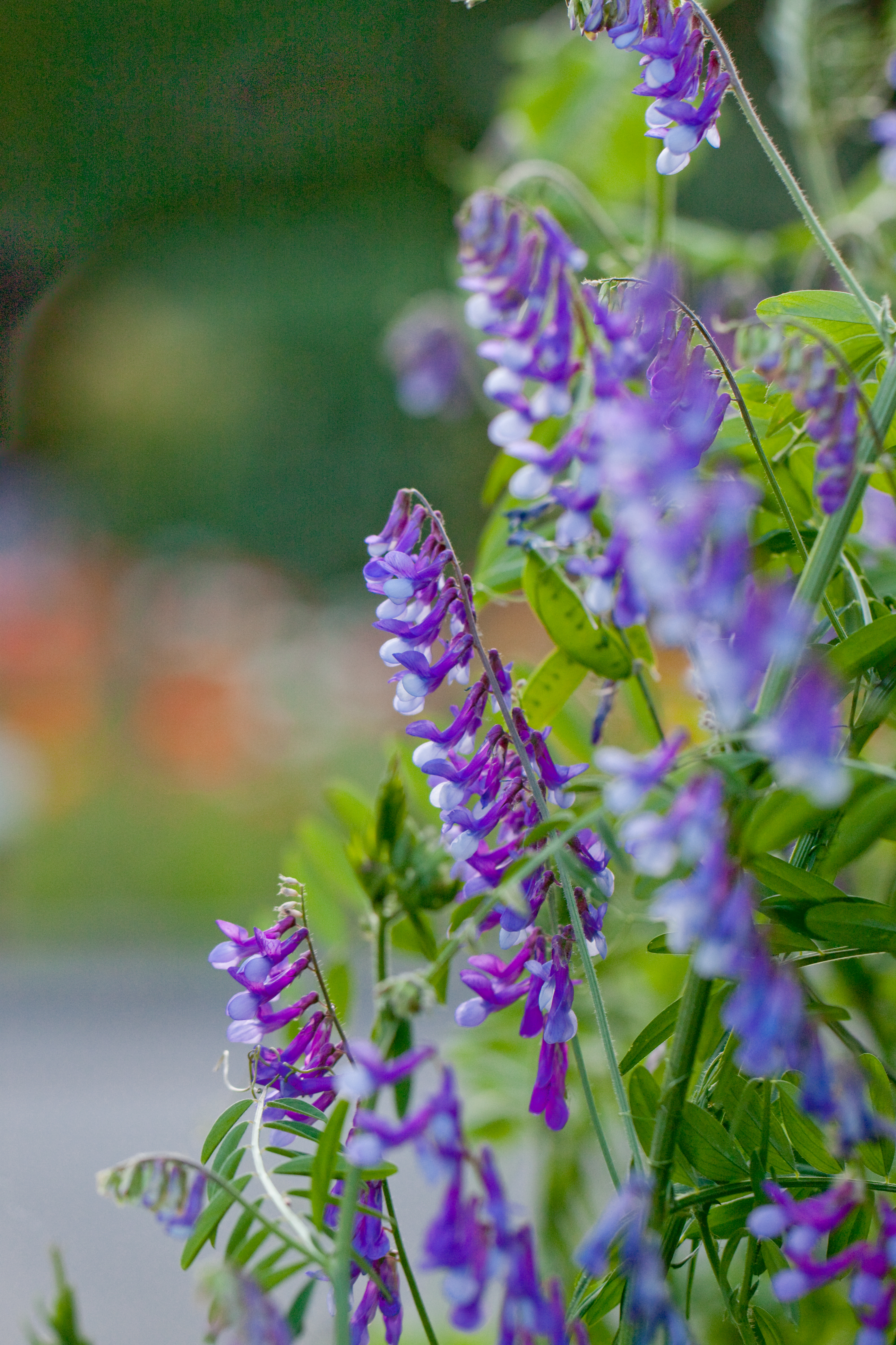 Hairy Vetch. ヘアリーベッチ。